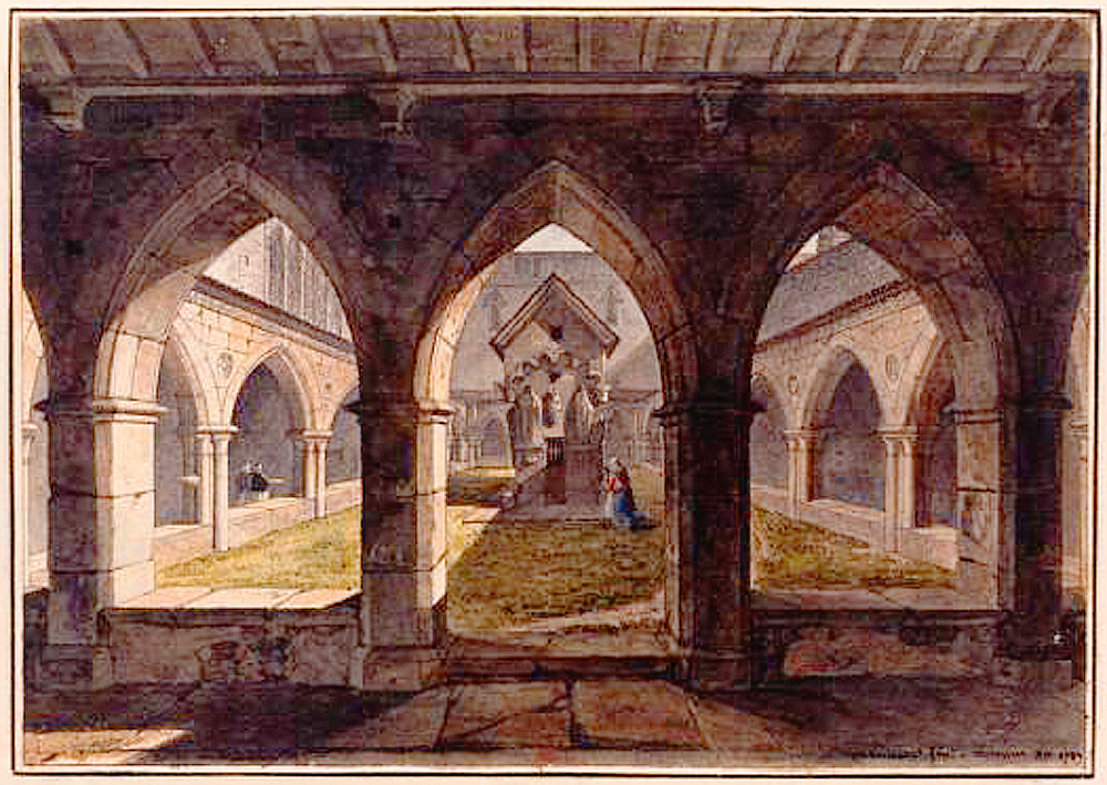 Cloitre de la cathédrale Saint-Maurice de Vienne